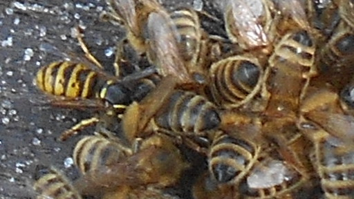 Dělnice vosy saské (Dolichovespula saxonica) konzumuje sladký roztok na vosím krmítku. Jsou zde i včely medonosné kraňské.